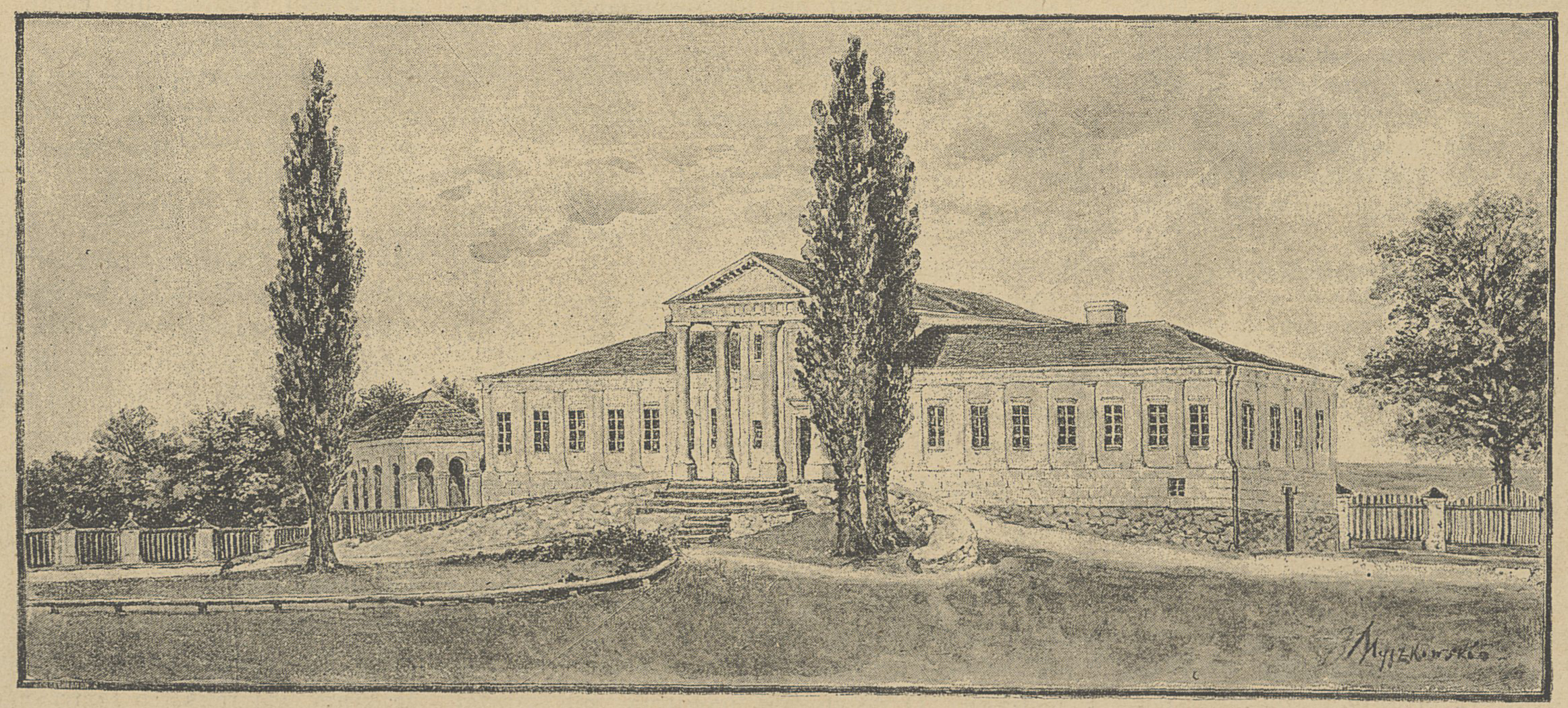 Беларуская (тарашкевіца): Валожын (Vałožyn), сядзіба Тышкевічаў (Tyškievič)